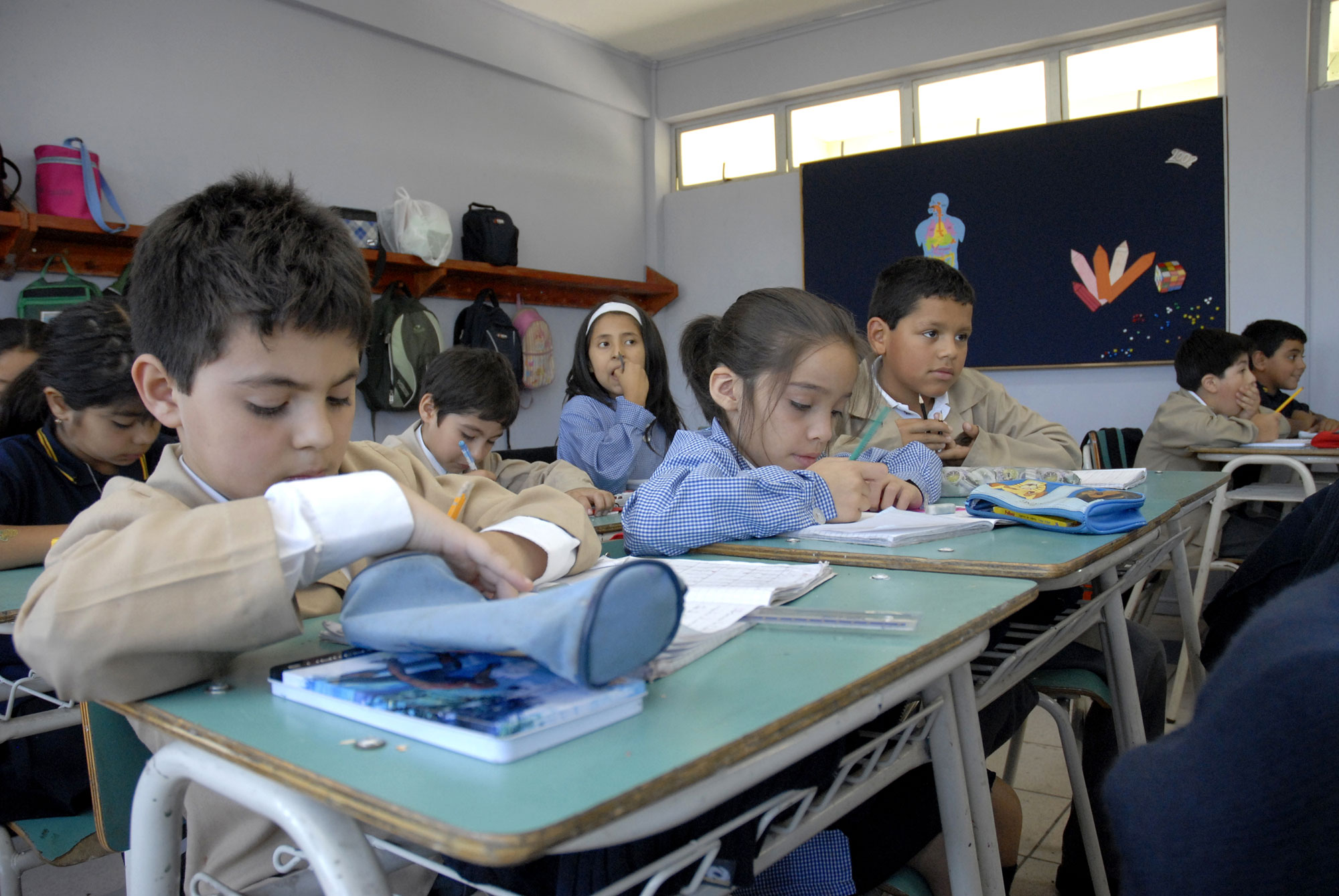 El equipo de investigadores de la Facultad de Educación de la Universidad Católica ha capacitado a alrededor de 180 profesores que trabajan con más de 4 mil alumnos de Kinder a Cuarto Básico.